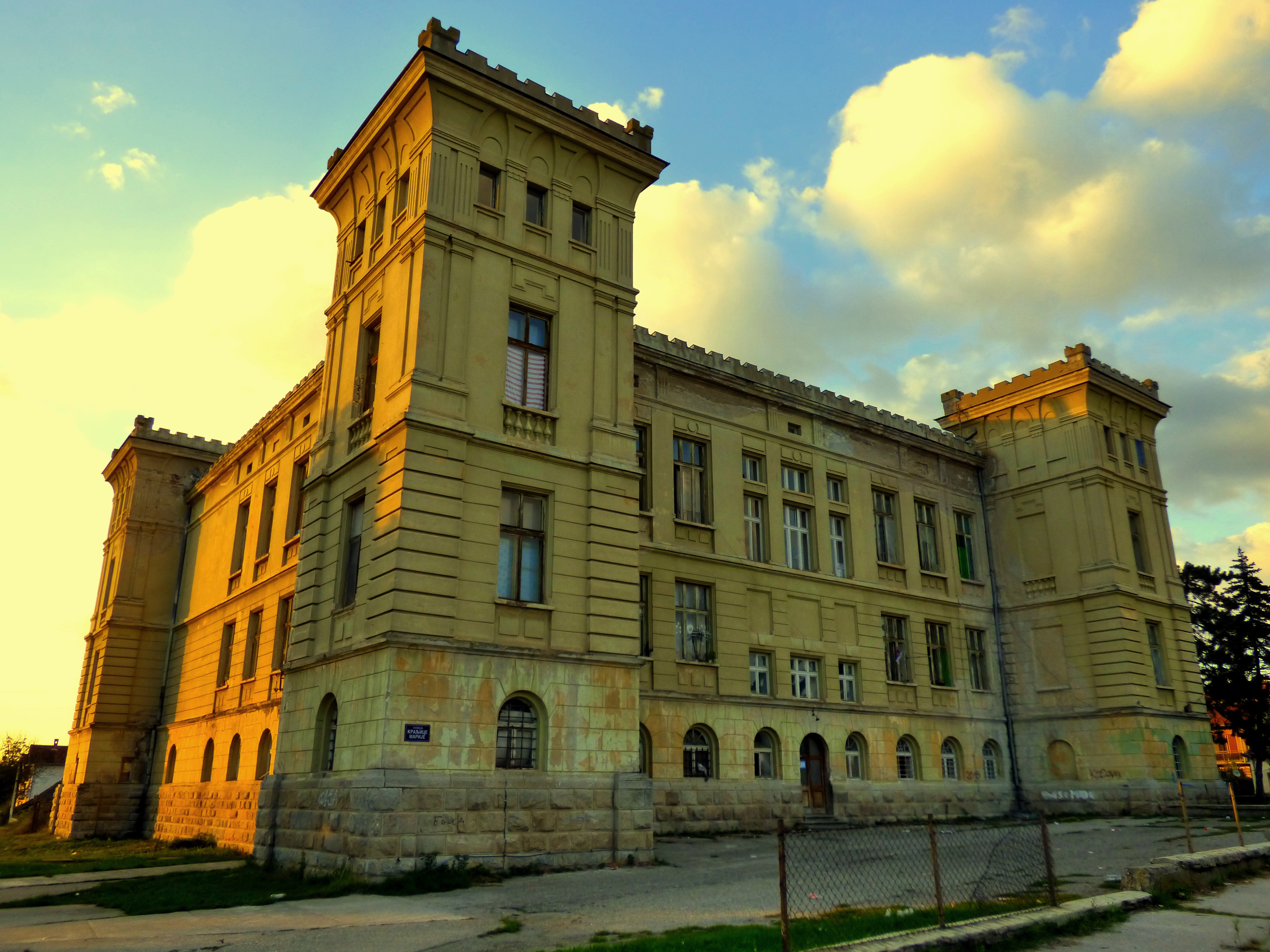 Карађорђев дом представља задужбину краљице Марије која је саграђена још 1932. године. Првобитно је била намењена ратној сирочади. Затим је, у периоду бивше Југославије, имала школску намену. Данас, здање краљице Марије преузима своју првобитну намену – сиротиште. Карађорђев дом представља двоспратну зграду, коју краси 5 зупчастих кула. По својој архитектури, дом је јединствен у Србији. Проглашен је спомеником културе од значаја. Данас се користи за смештај расељених лица са Косова и Метохије.